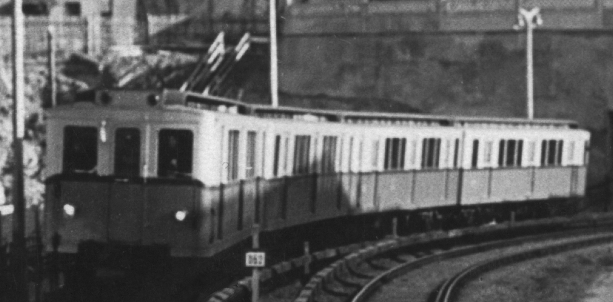 Электропоезд метро типа В-2 на участке станциями «Кутузовская» и «Фили» Филёвскогой линии Московского метро